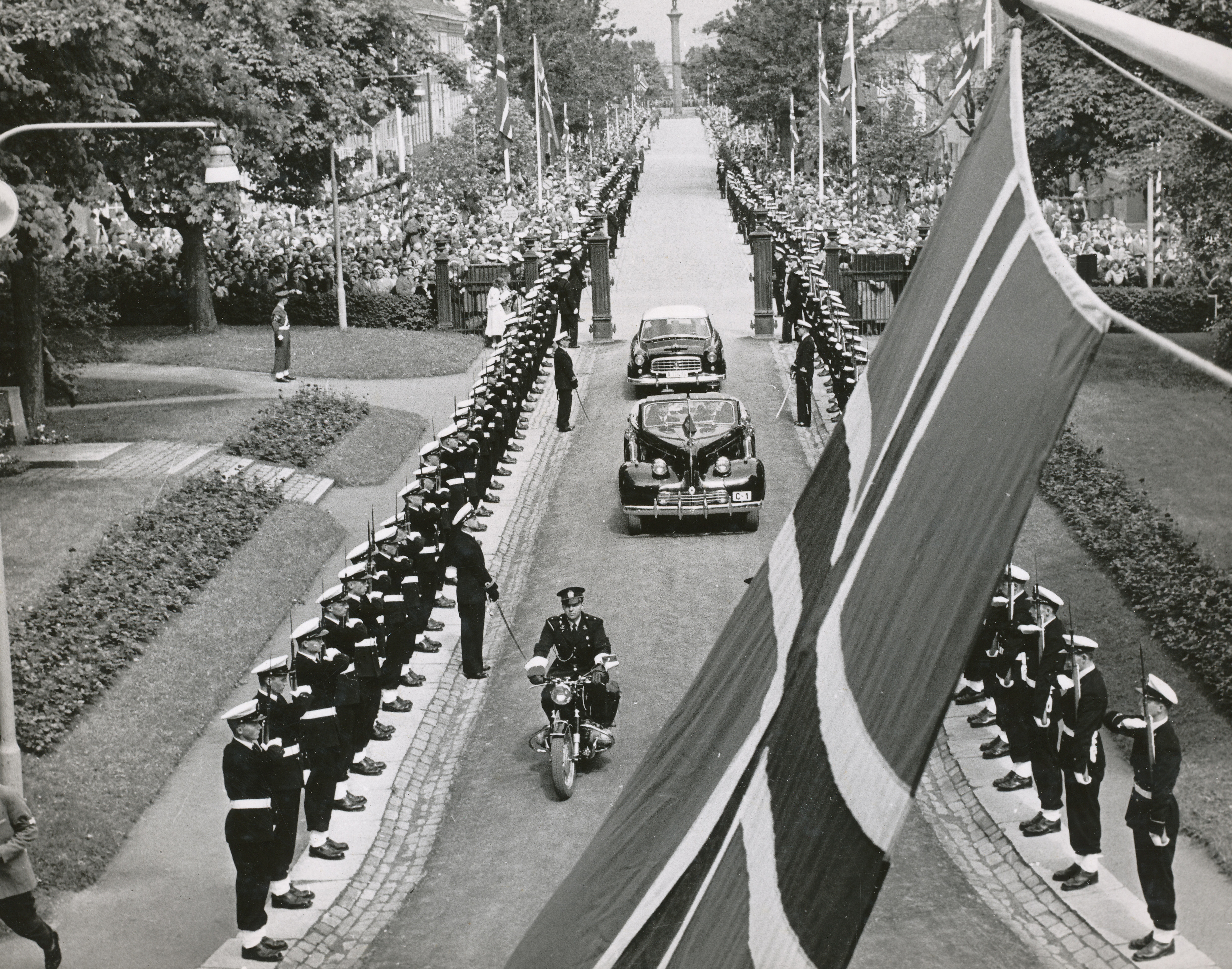 Signingen til kong Olav i Trondheim i 1958.